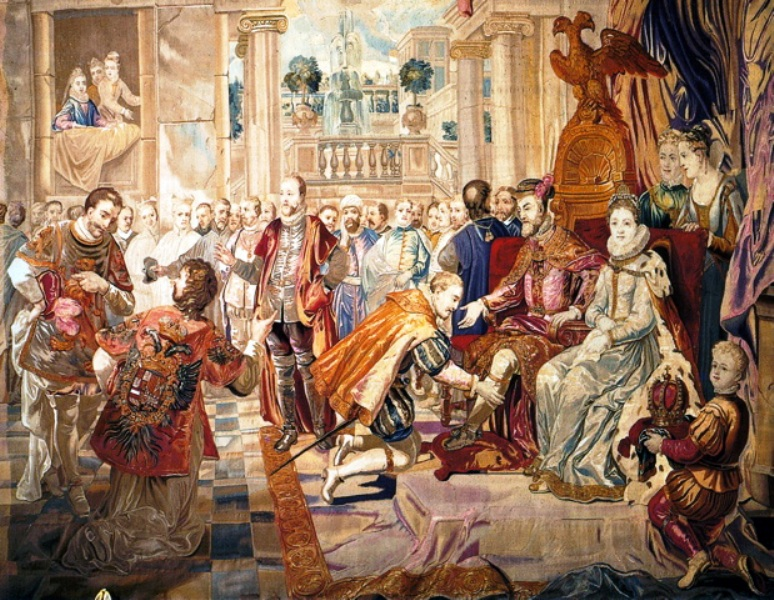 Tapisserie du XVIIIe siecle, de l' atelier Leyniers et Reydams , représentant l'abdication de Charles Quint au palais du Coudenberg